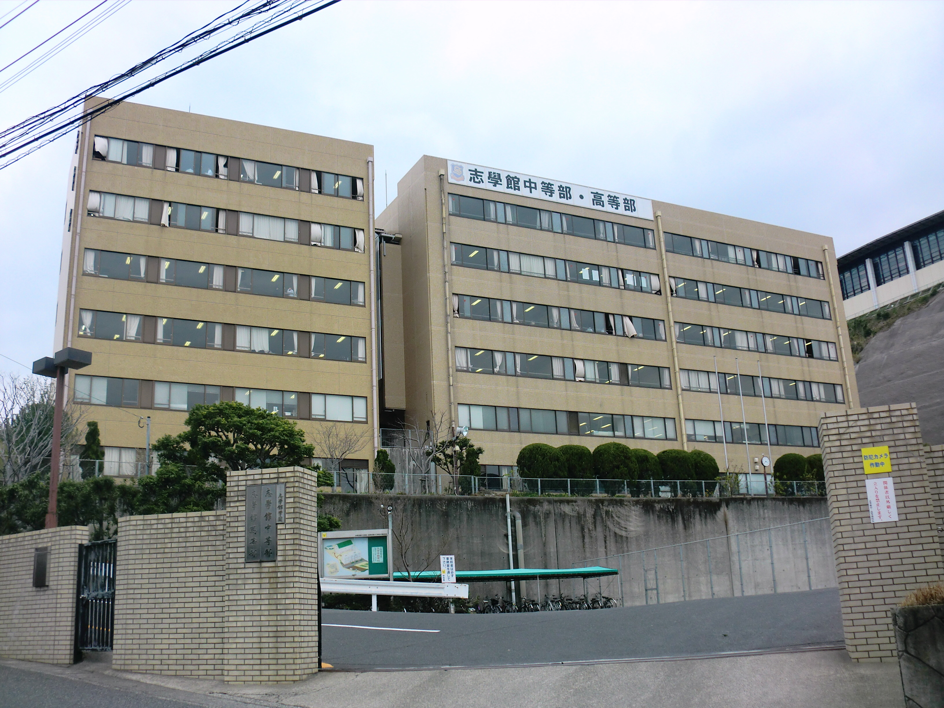 鹿児島市にある志学館学園志学館中学校・高等学校